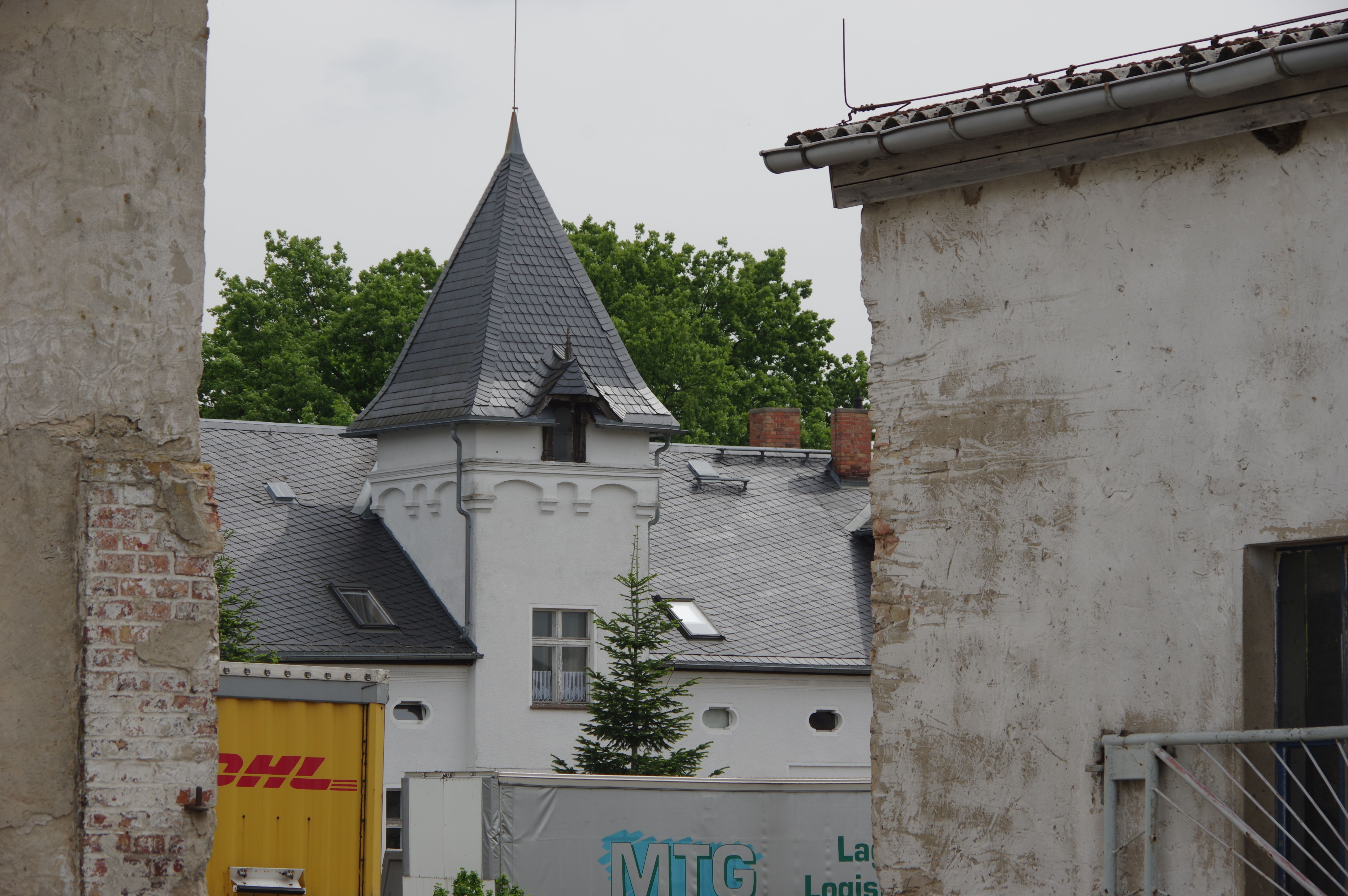 Brandenburg an der Havel. Das Gutshaus in Klein Kreutz steht unter Denkmalschutz.